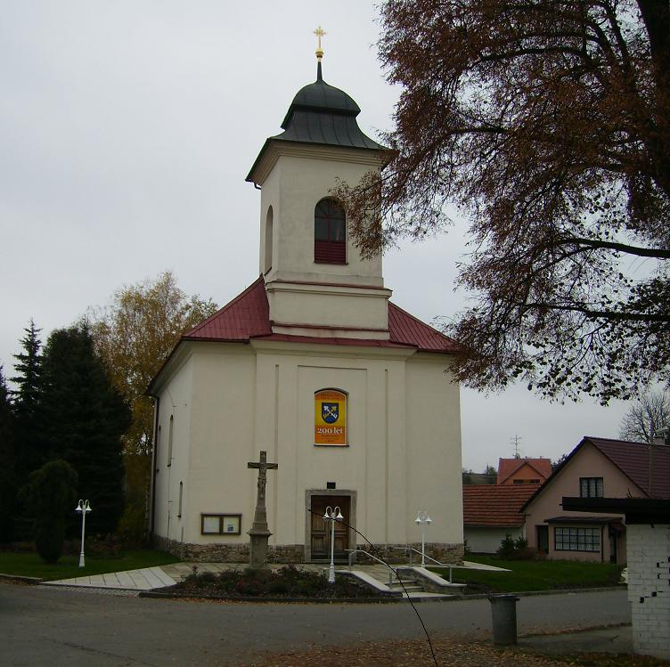 Kostel sv. Petra a Pavla v Křoví na Moravě